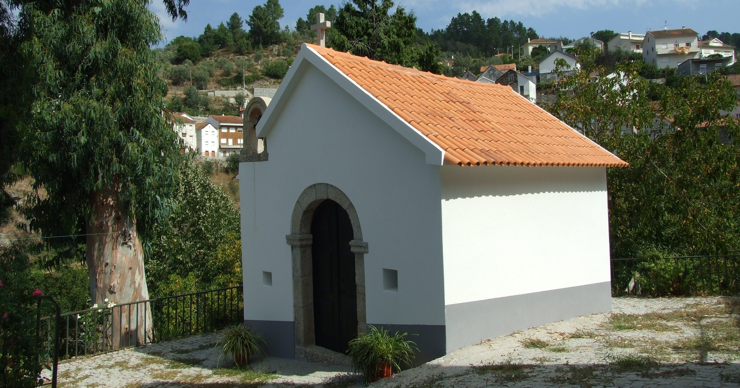 Capela da Nossa Senhora da Criação, S.Gião, Oliveira do Hospital, Portugal